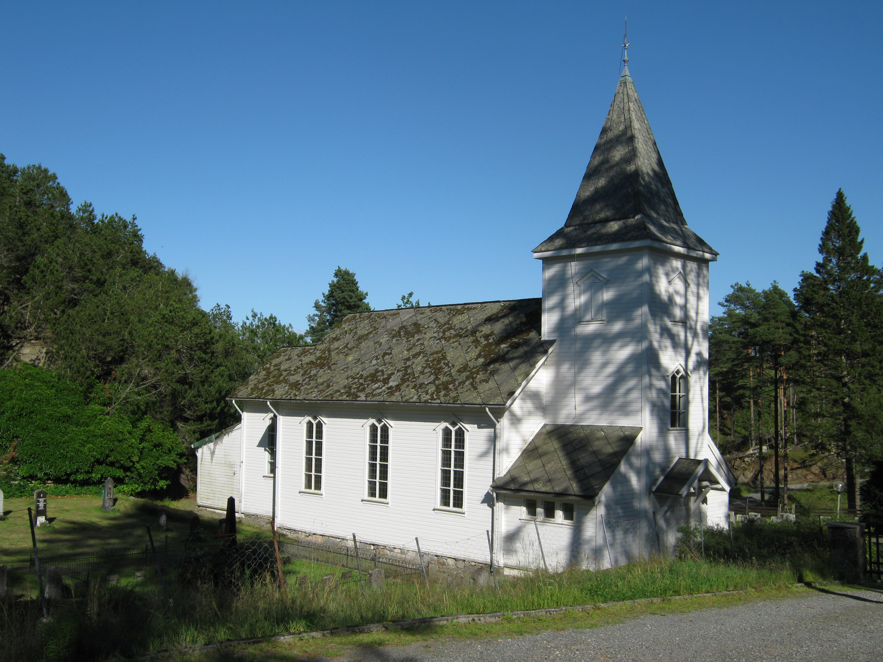 Bekkjarvik kapell i Austevoll kommune